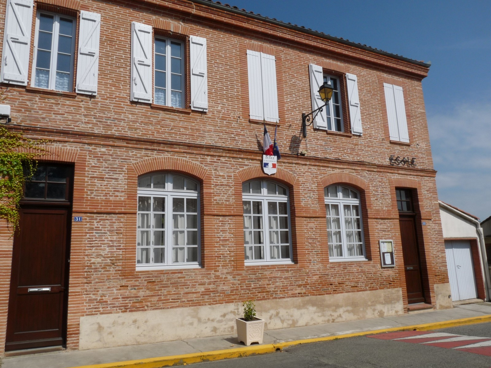 Ecole de Mauremont, Haute-Garonne, France